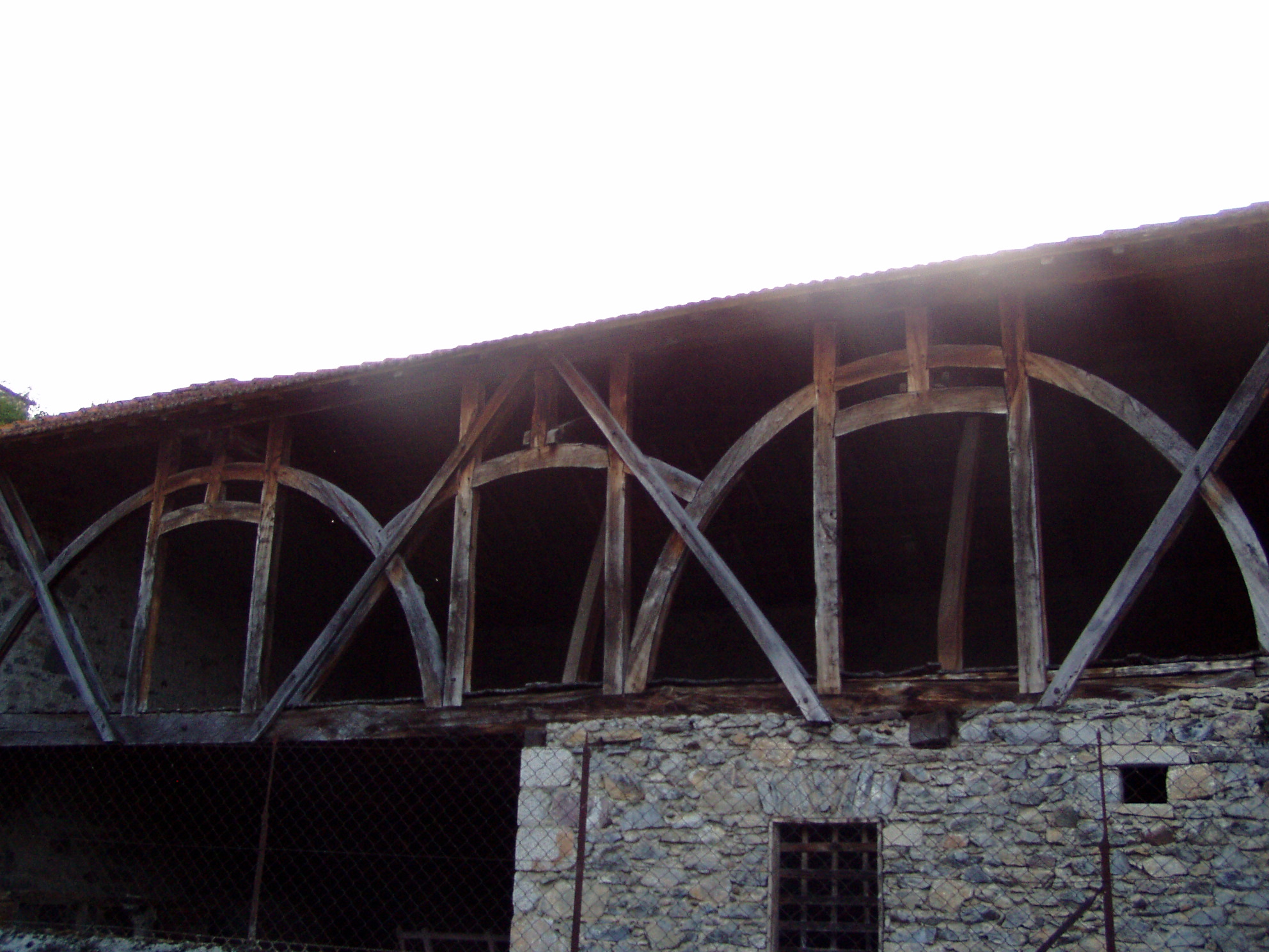 Grange dans la ville basse de Saint-Bertrand-de-Comminges (Haute-Garonne, France).